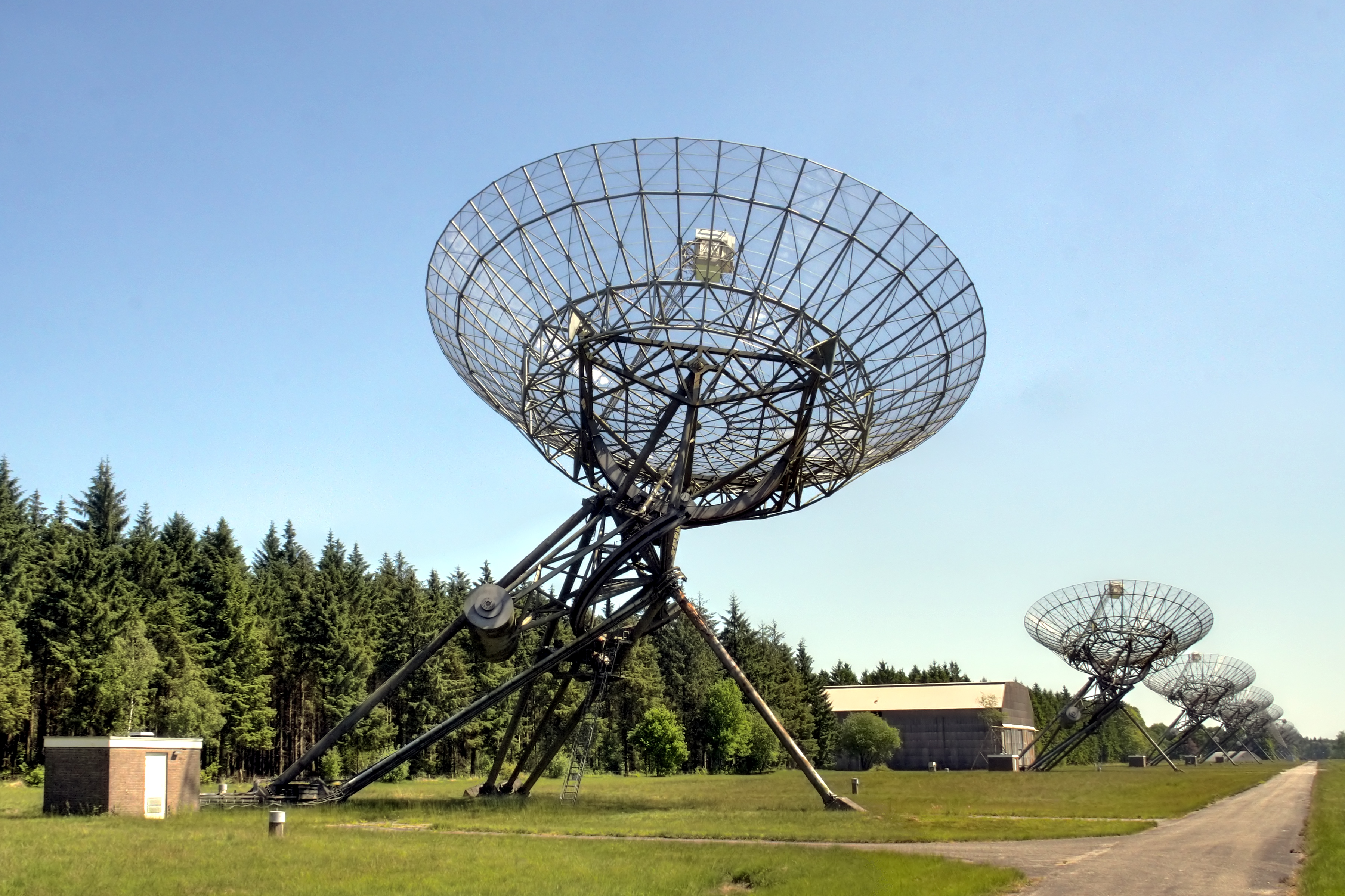 Westerbork Synthesis Radio Telescope WSRT, Niederlande